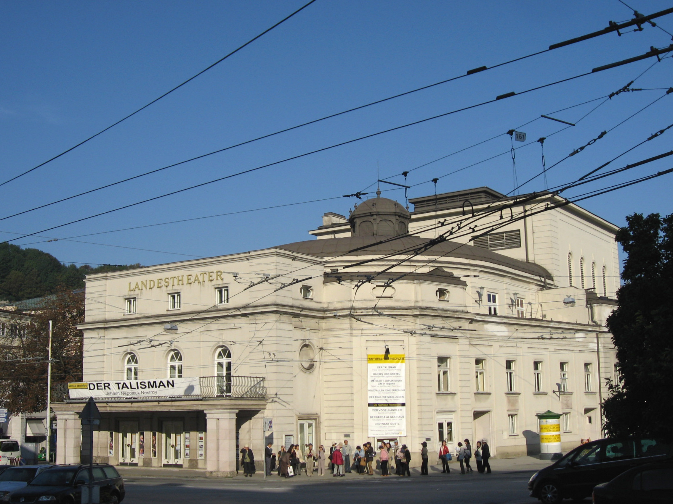 Salzburger Landestheater, Aussenansicht